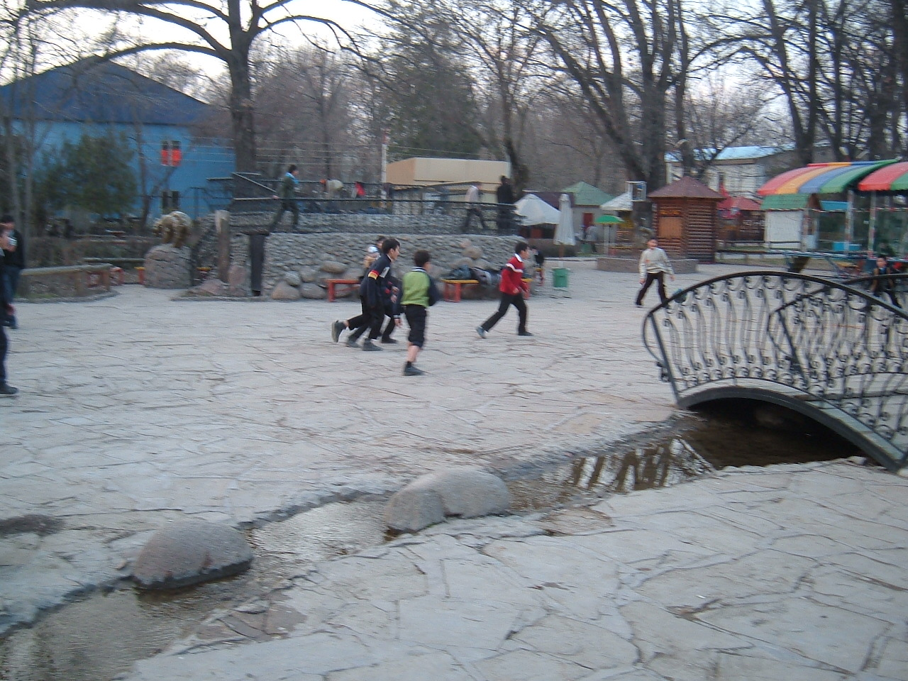 Kengbaba garður. Sjimkent, höfuðborg Suður-Kasakstans.